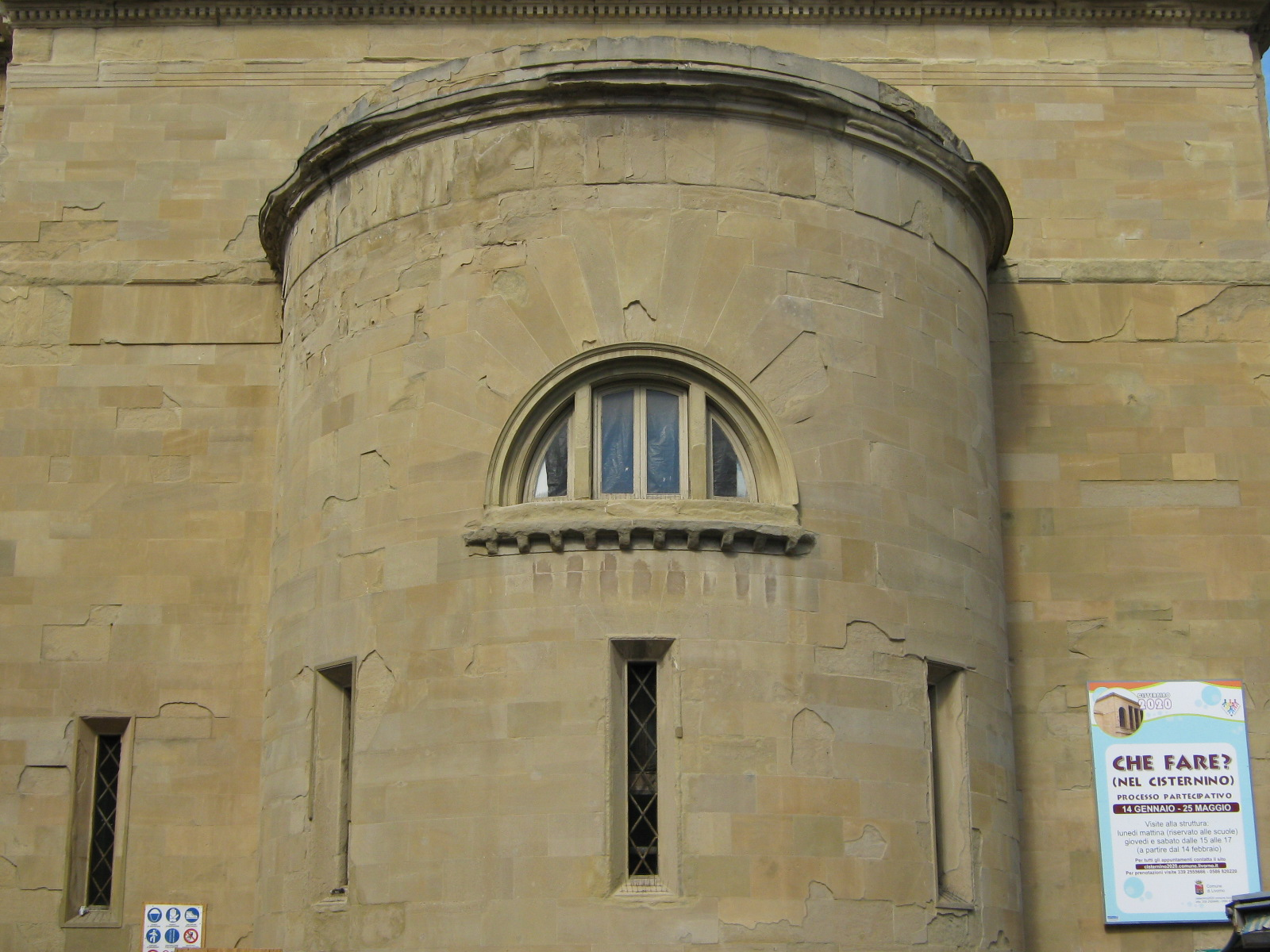 Livorno: particolare del Cisternino di città, costruito da Pasquale Poccianti per il completamento dell'Acquedotto di Colognole.